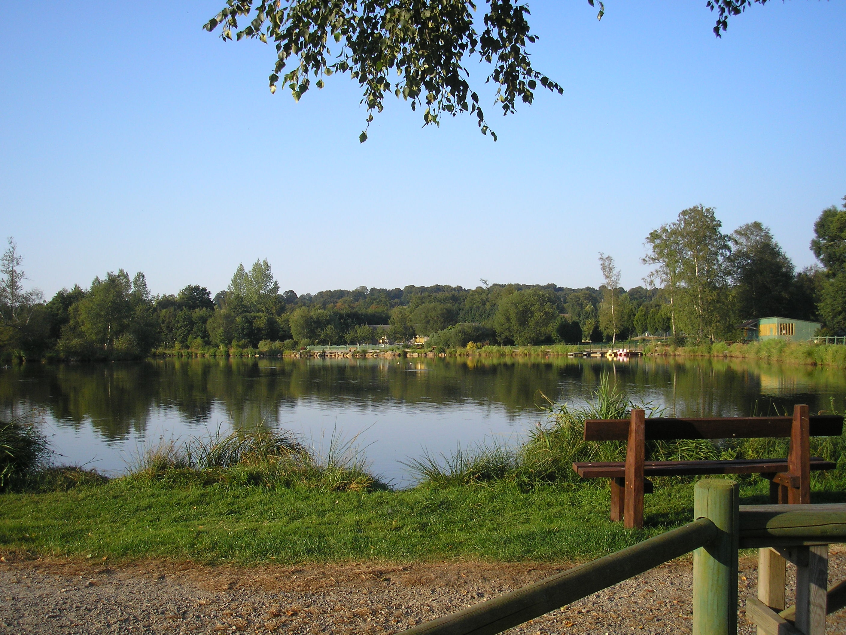 Larchamp (Normandie, France). L'étang de la Cour.